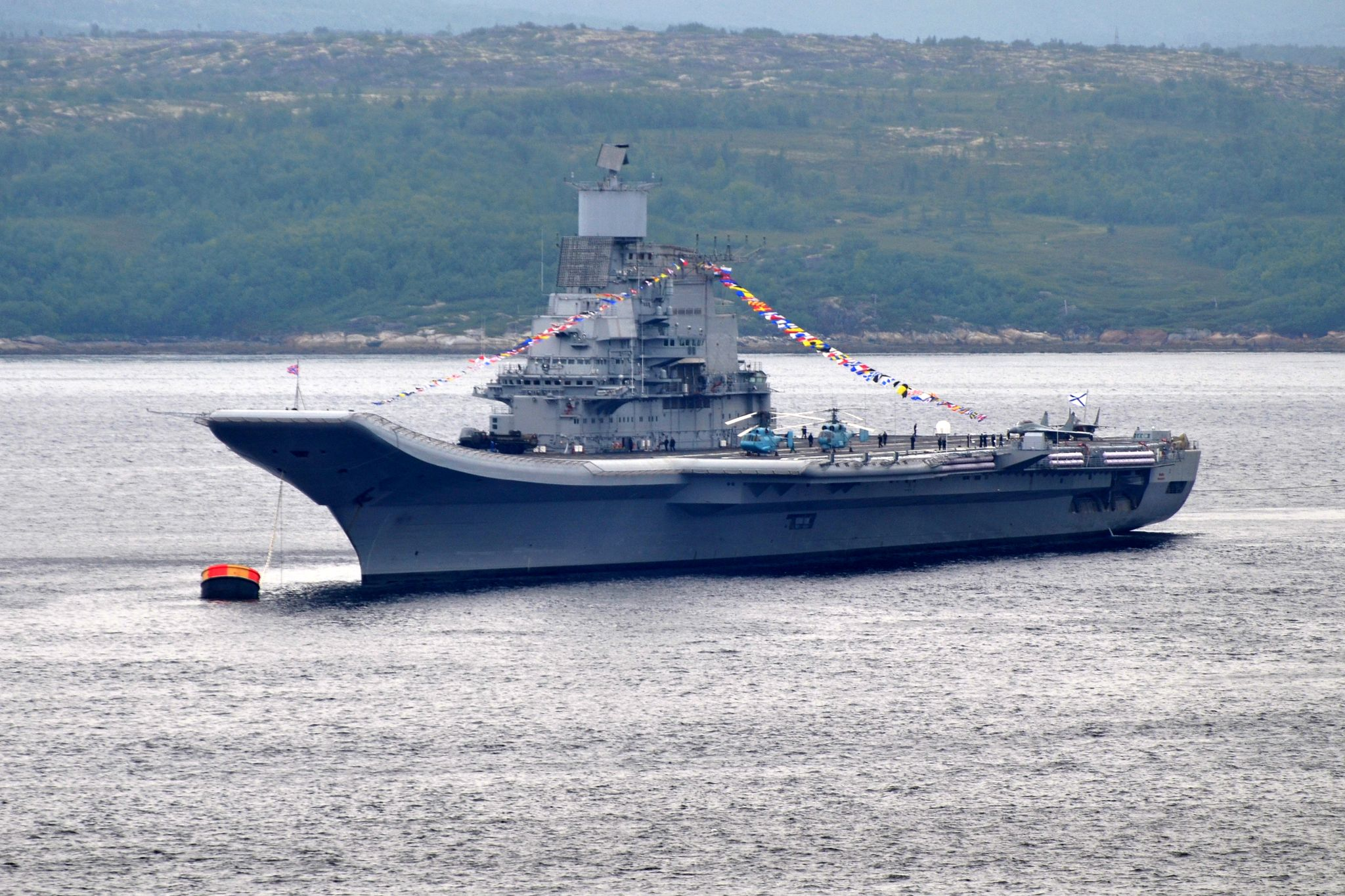 Лёгкий авианосец «Викрамадитья» на параде кораблей Северного флота ВМФ России в Североморске. День ВМФ России 2012.